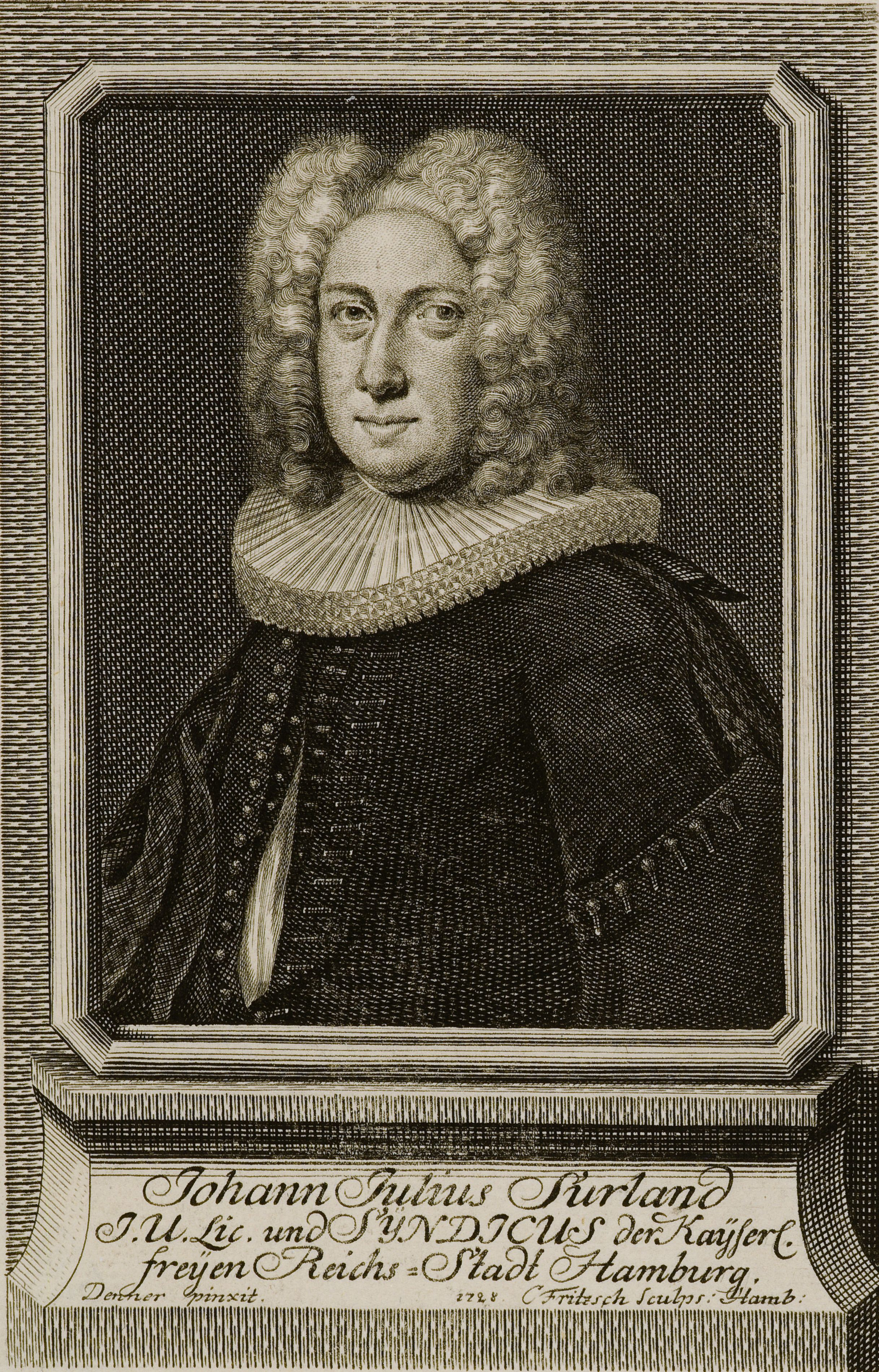 Bildnis von Johannes Julius Surland